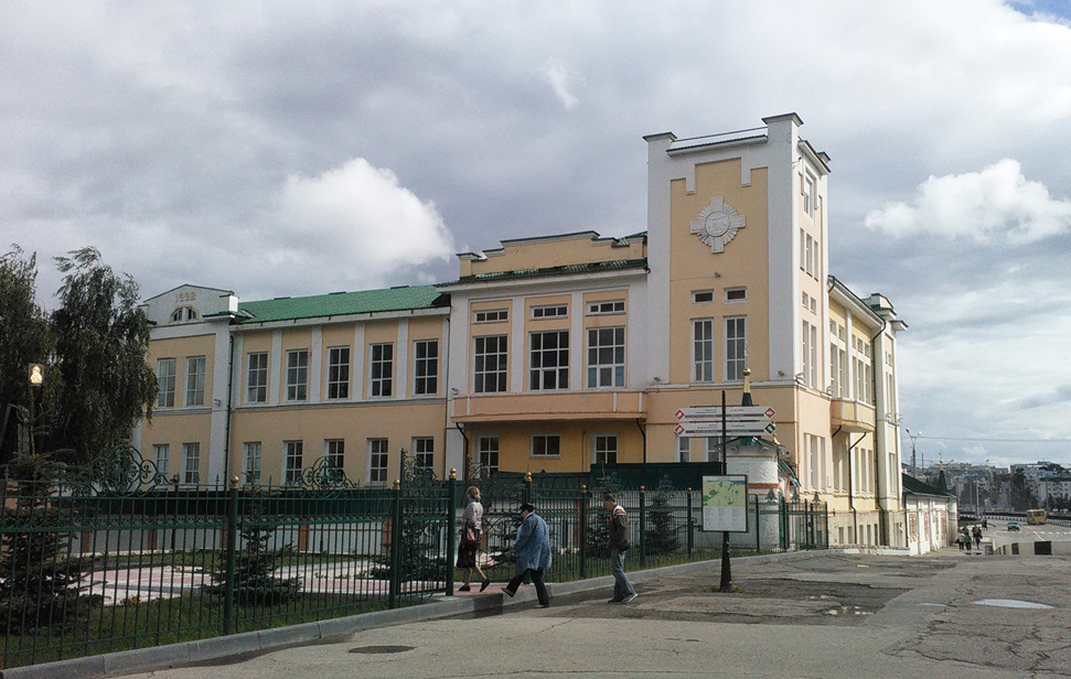 Дом крестьянина: улица Константина Иванова, 5 (Р.Люксембург., 16), Чебоксары, Чувашия